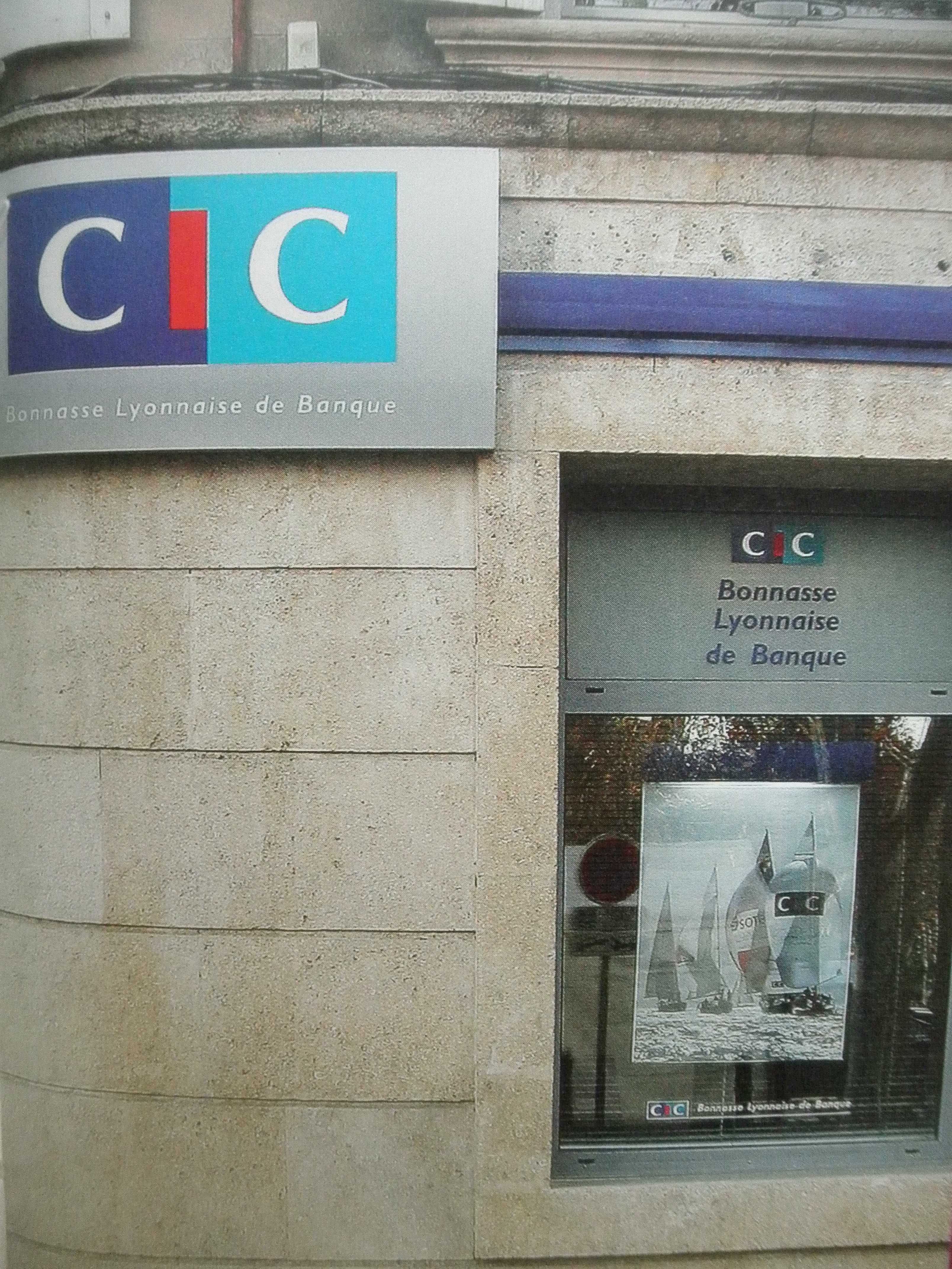 banque